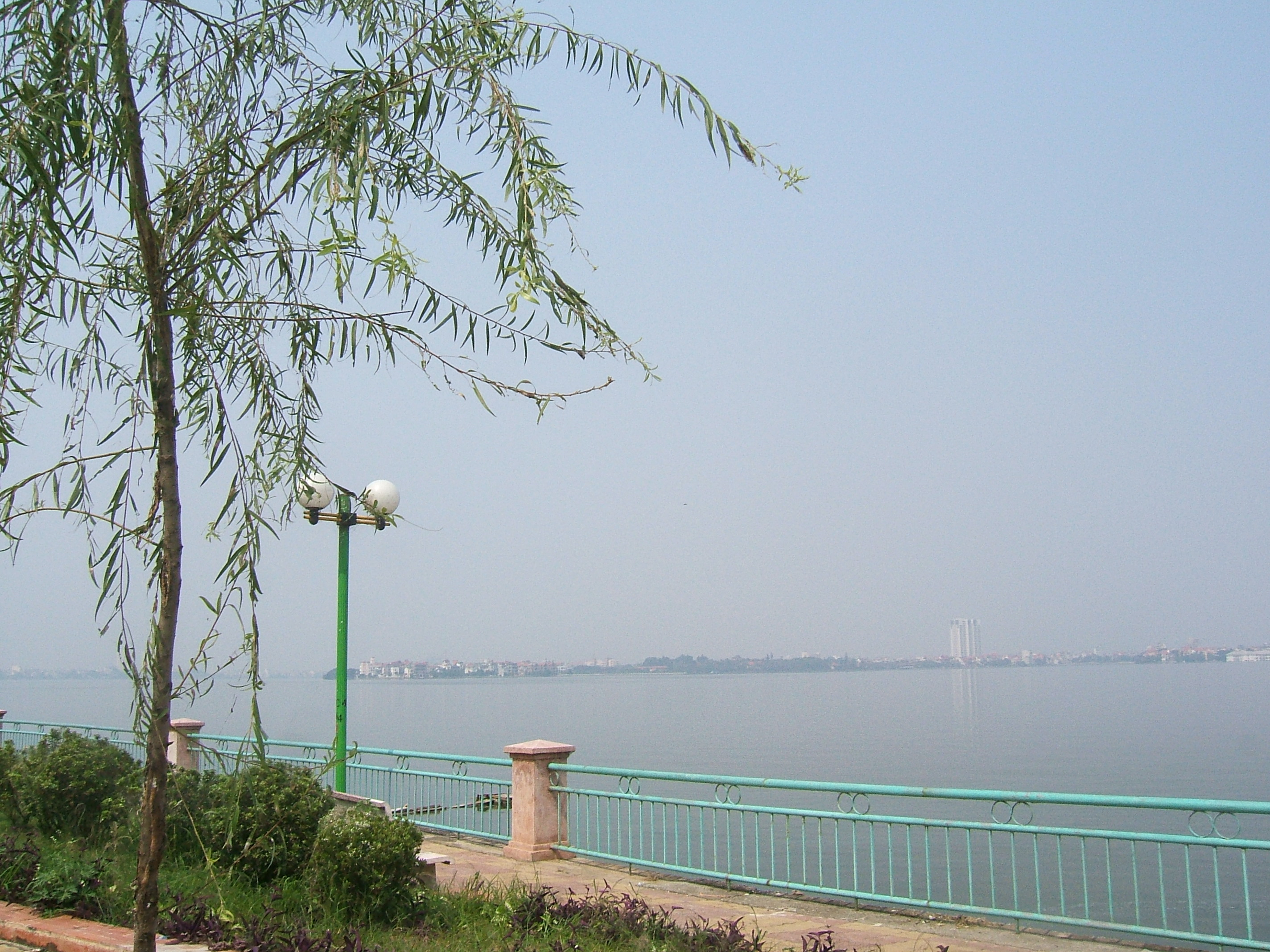 Con đường mới mở vòng quanh hồ Tây cho phép du khách tham quan ngoạn cảnh dễ dàng.